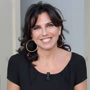 Annalisa Bruchi